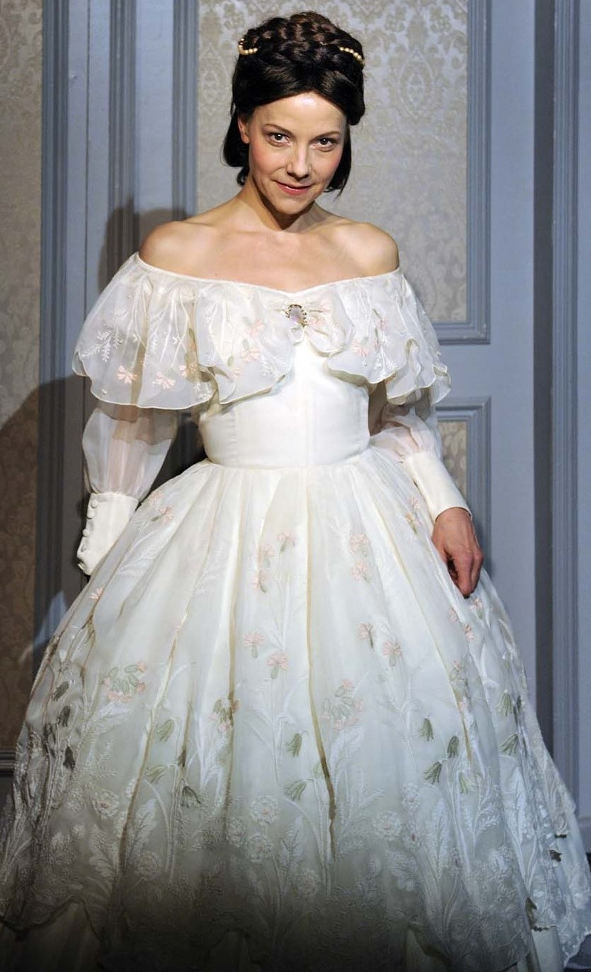 Fotograf Friedhelm Schulz